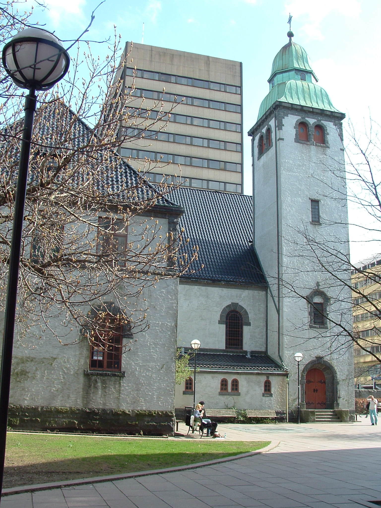 St.Jakobs kirke, Bergen